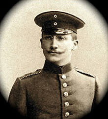 Leo Schnug, né le 17 février 1878 à Strasbourg en Alsace et décédé le 15 décembre 1933 à l’hôpital psychiatrique de Brumath-Stephansfeld, est un peintre et illustrateur alsacien